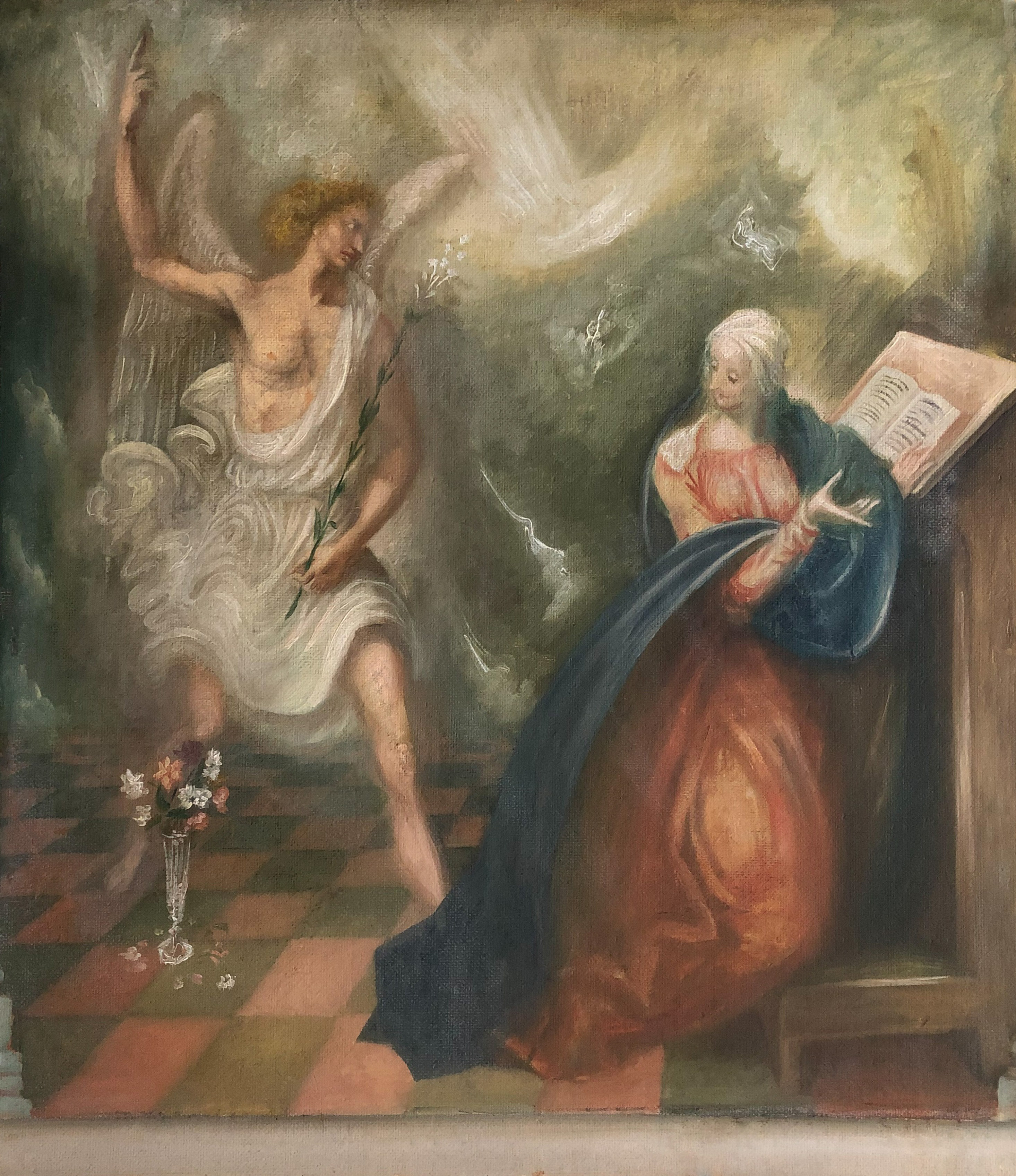 Foto van schildering op board